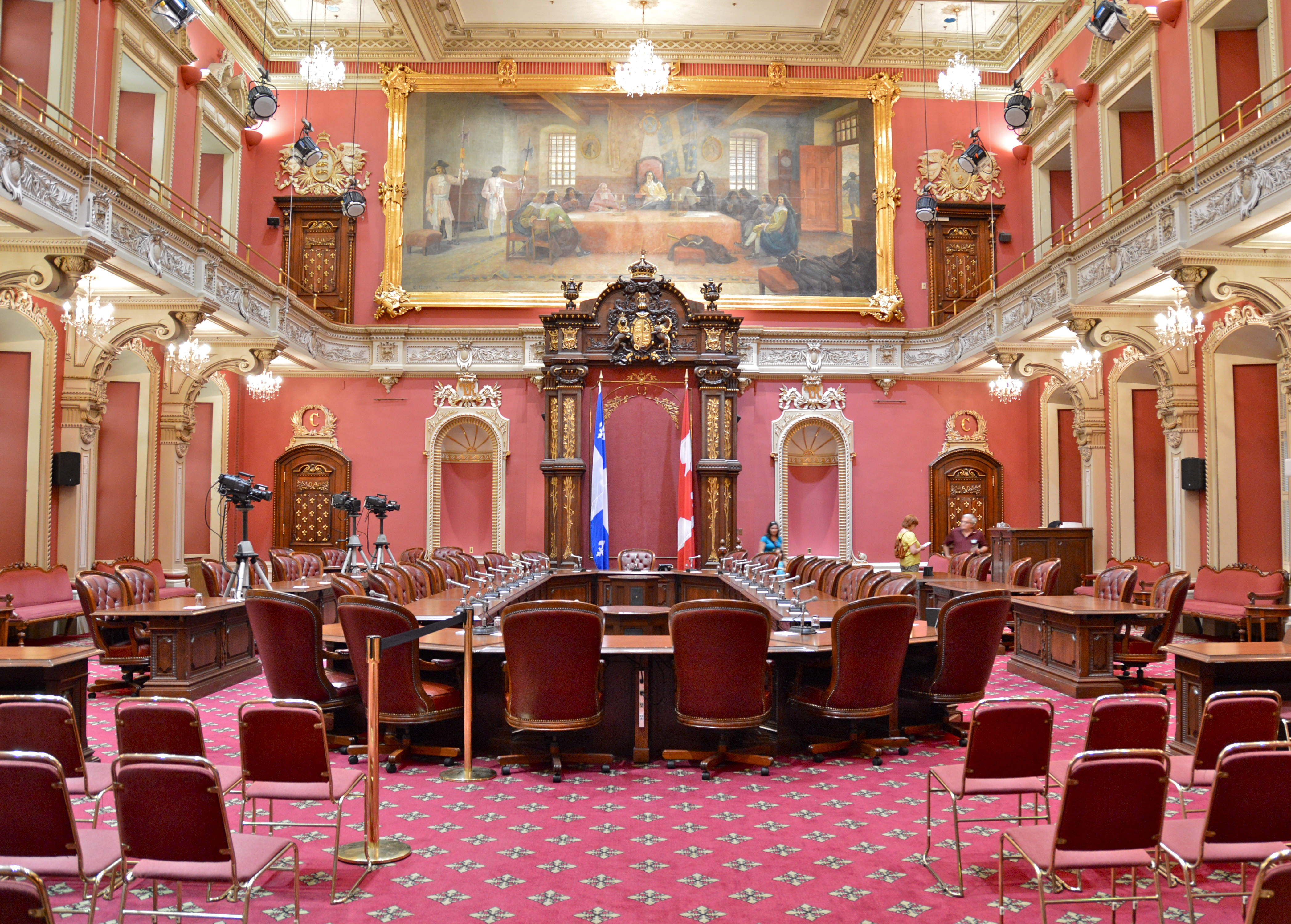 Le salon rouge de l'hôtel du Parlement à Québec